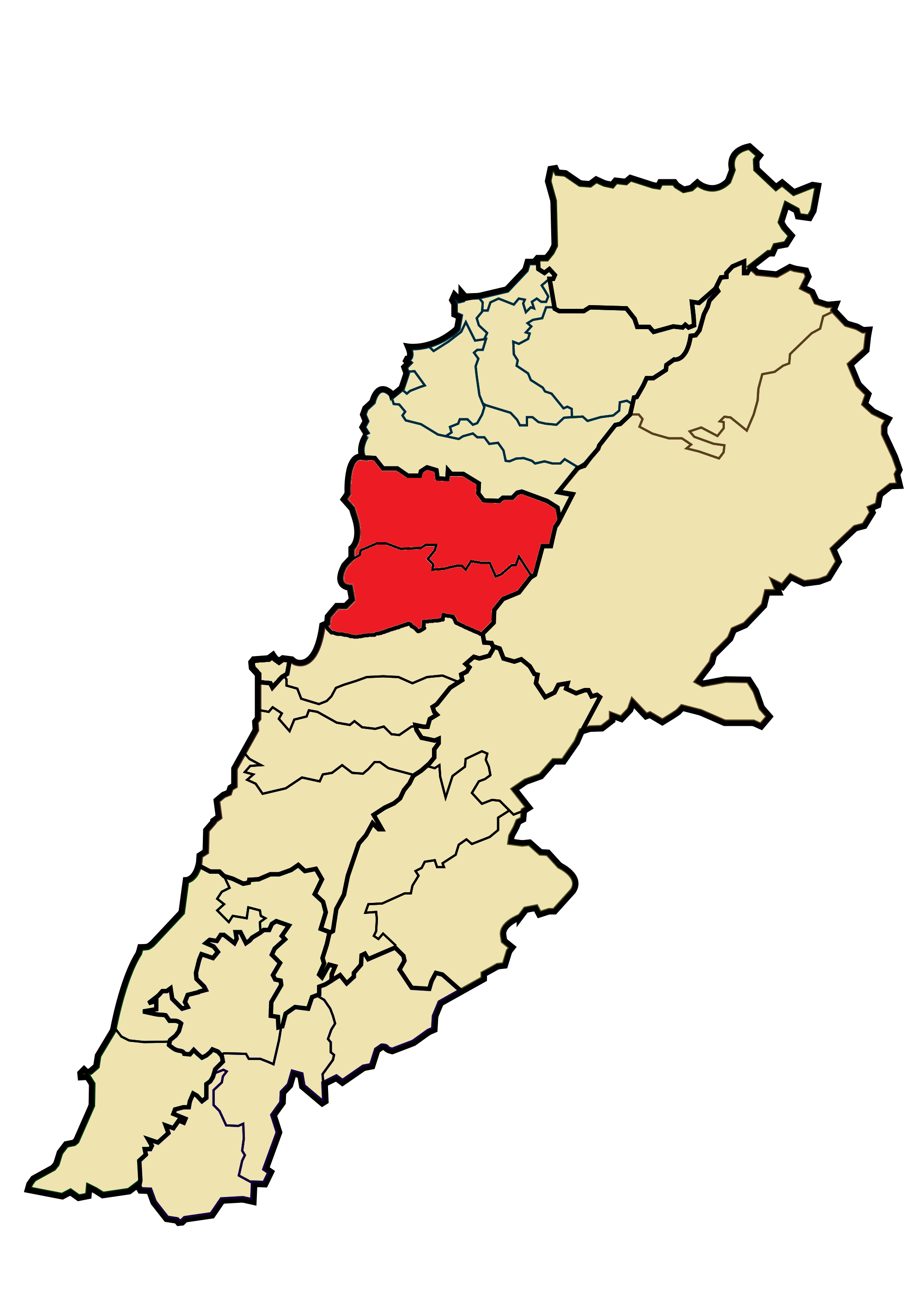 ケセルワン＝ジュベイル（Keserwan-Jbeil）の位置